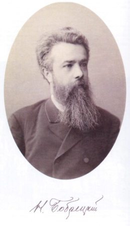 Бобрецький Микола Васильович